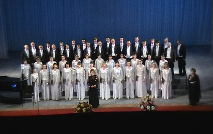 Зображення з концерту Академічного хору ім. П. Майбороди НТРК України у м. Луцьк, з нагоди відкриття фестивалю "Стравінський та Україна"